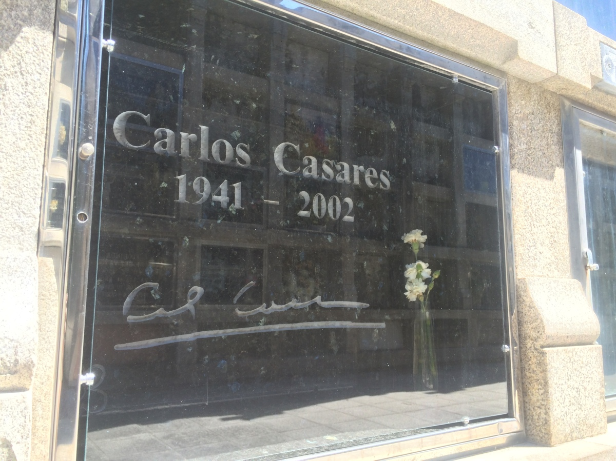 Lugar onde repousan os restos de Casares, en Nigrán, CC BY-SA Praza Pública.